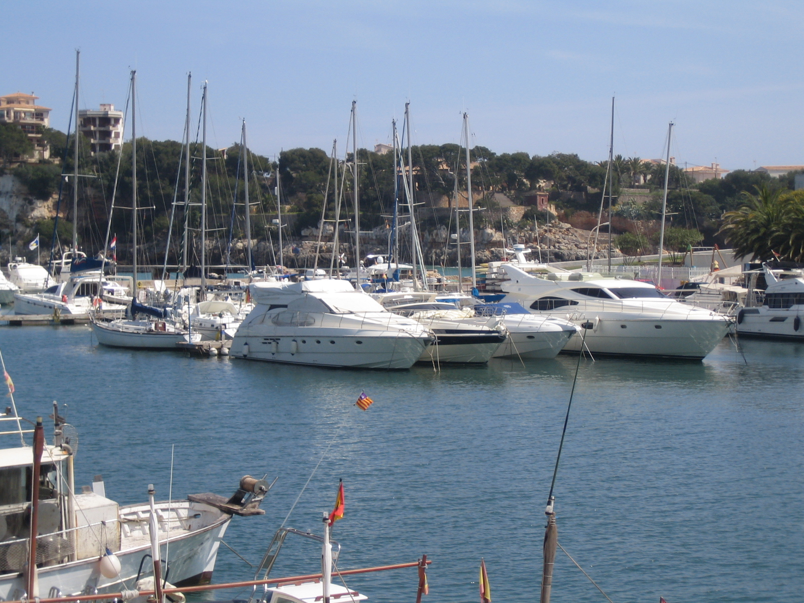 Hafen von Portocristo